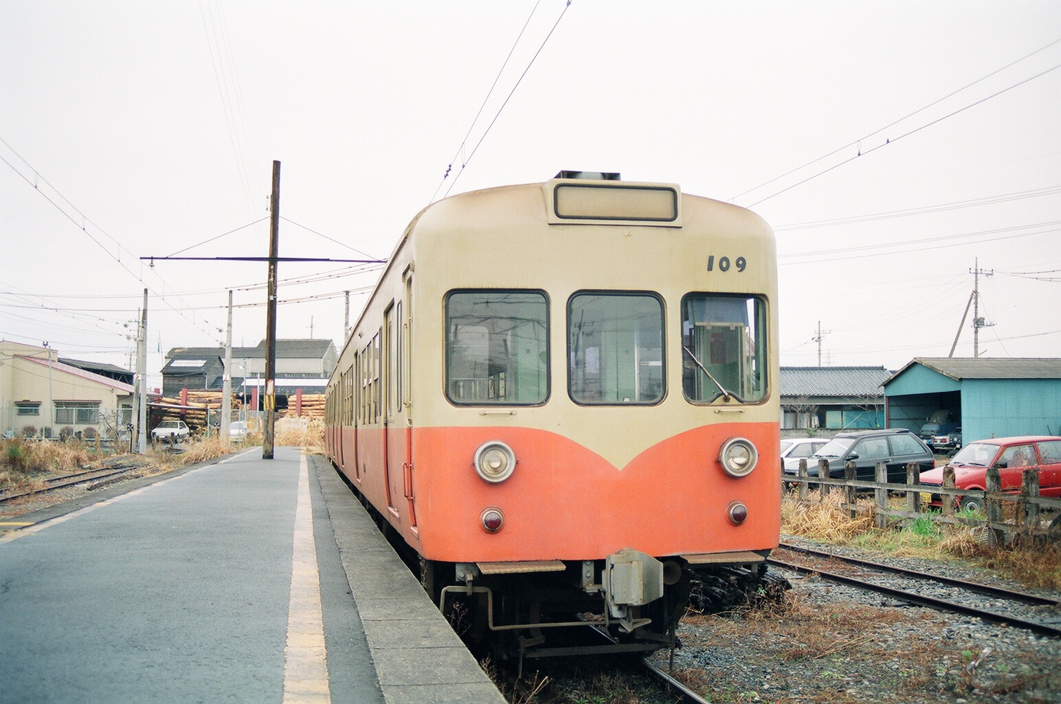 日立電鉄のクハ109+クモハ110の編成。常北太田駅にて撮影。